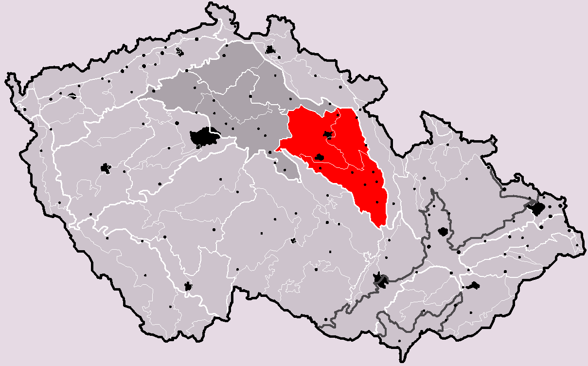 Poloha geomorfologické oblasti Východočeská tabule v rámci České republiky. Hercynský systém Hercynská pohoří I Česká vysočina I6 (VI) Česká tabule I6C (VIC) Východočeská tabule